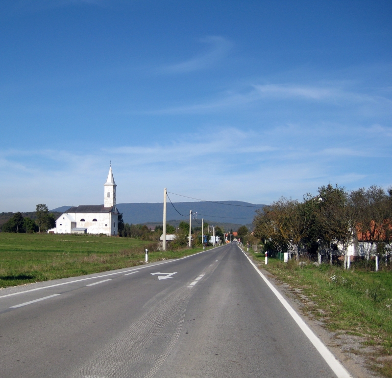 Križpolje, Lika, Croatia